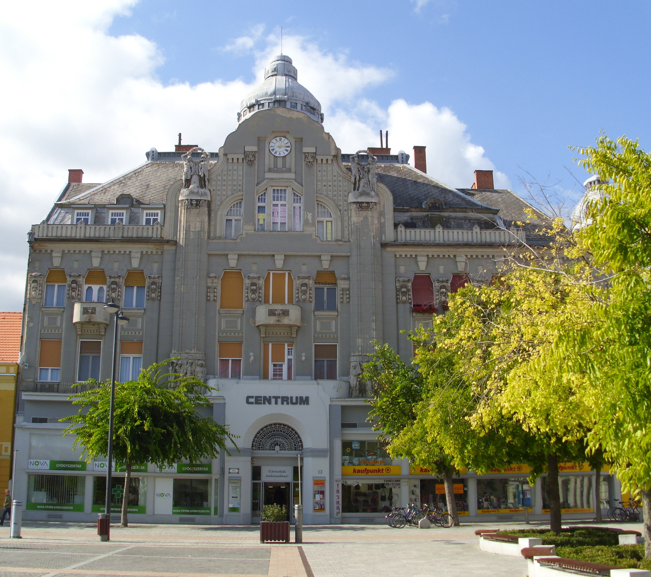 egykori Takarékpénztár (Szombathely, Fő tér 12.) This is a photo of a monument in Hungary, Identifier: 11682